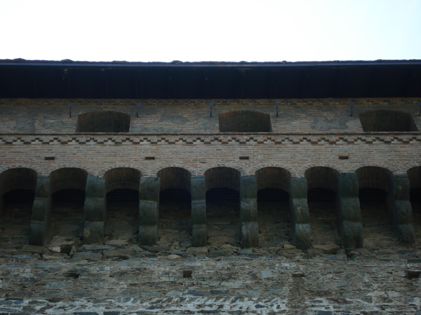 Beccatelli nel castello di Verres in Valle d'Aosta